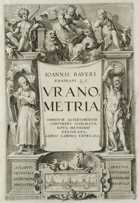 Uranometria